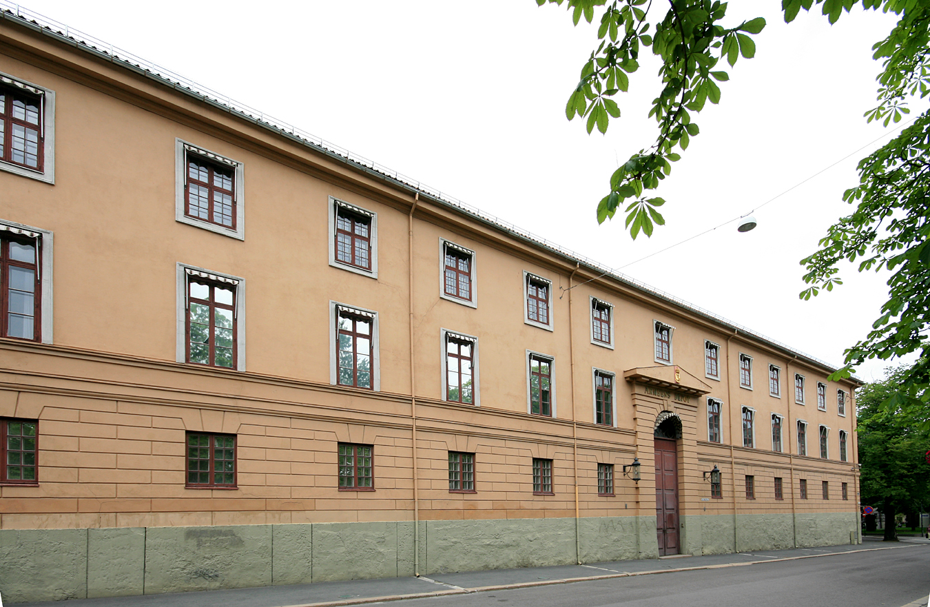 Armeens depot, Akershus festning, Oslo. Bygd 1832 eter tegninger av ingeniørkaptein Michael Smith Arentz i empirestil.